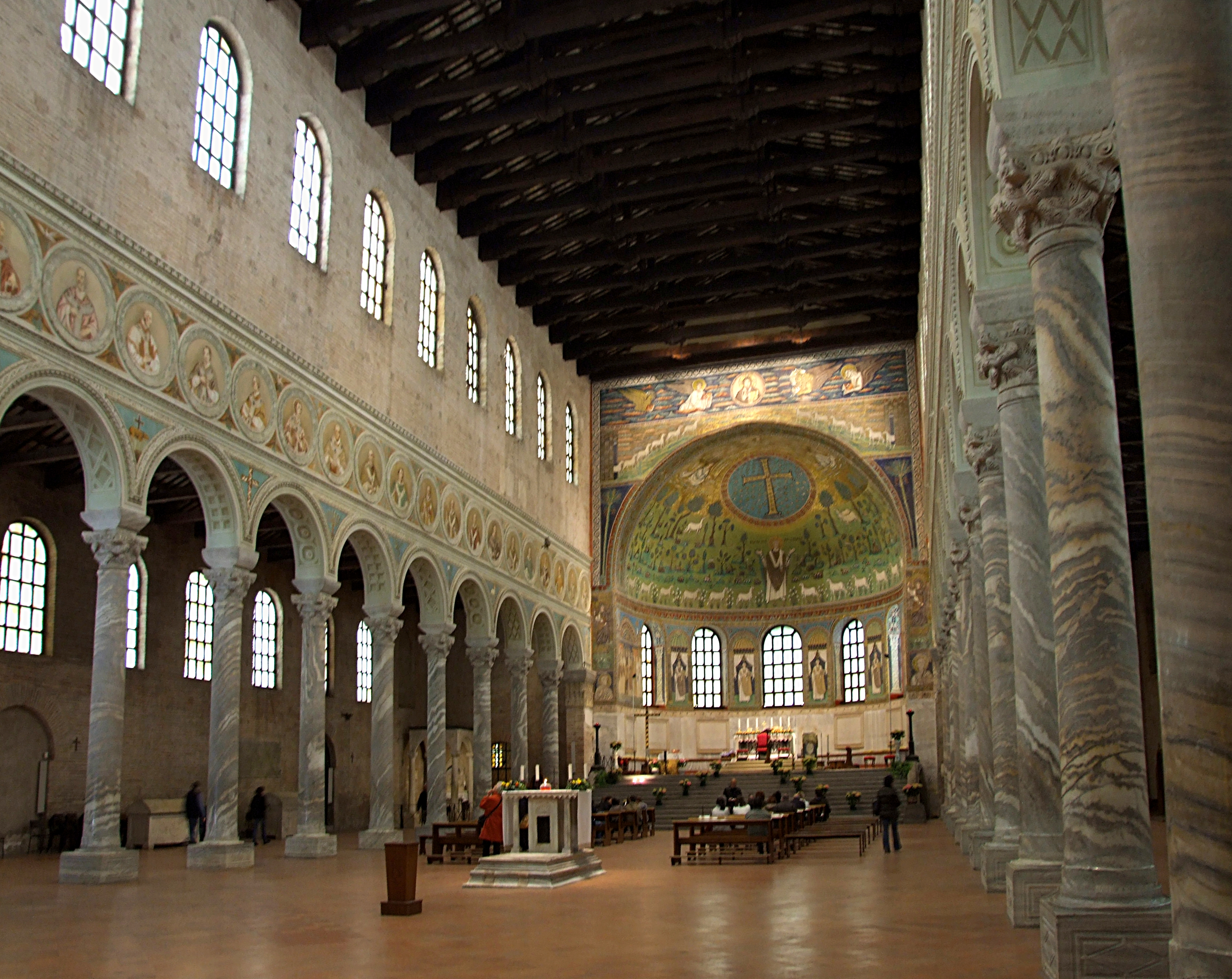 Basilica di Sant'Apollinare in Classe This is a photo of a monument which is part of cultural heritage of Italy.